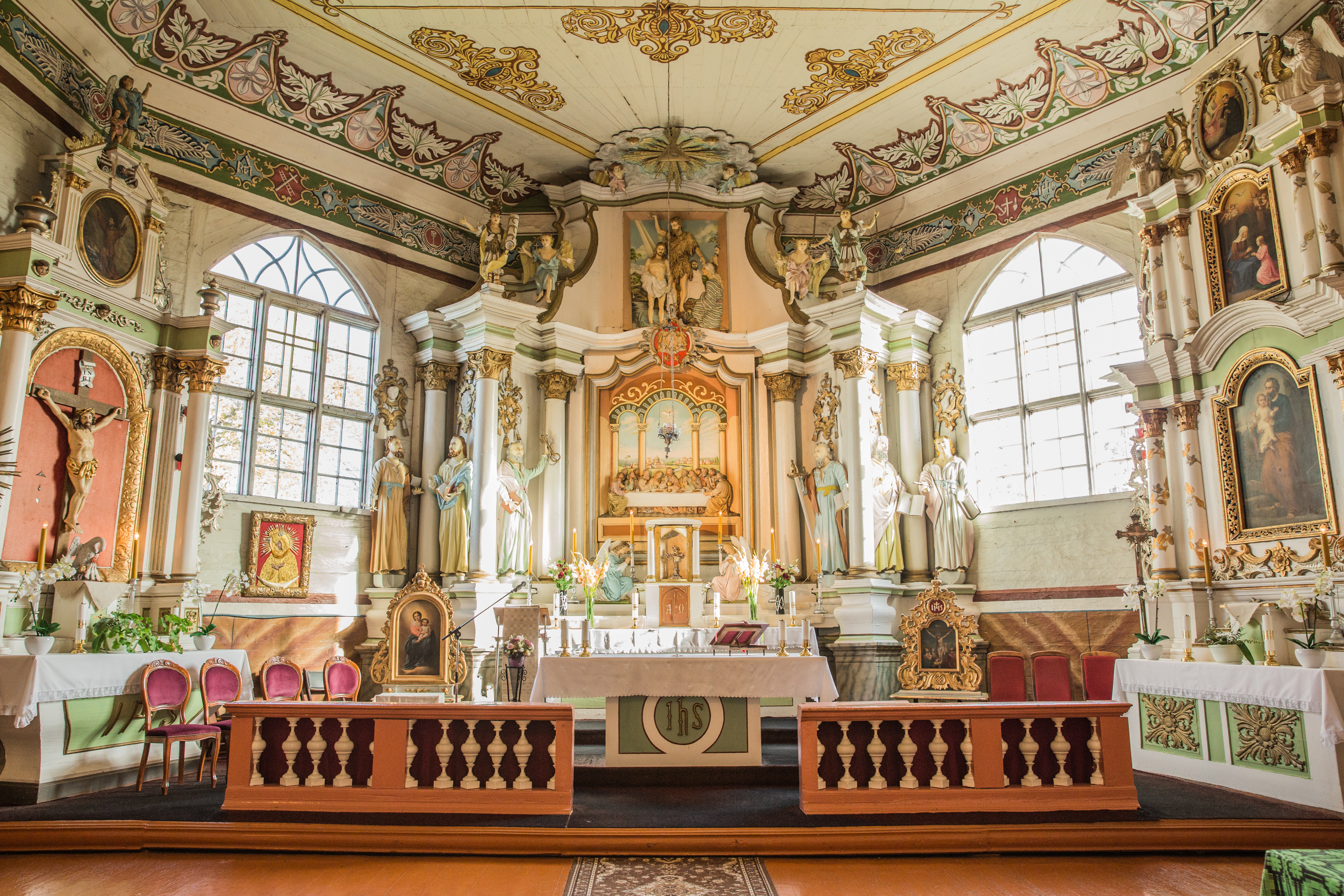 Luokės Visų Šventųjų bažnyčios viduj